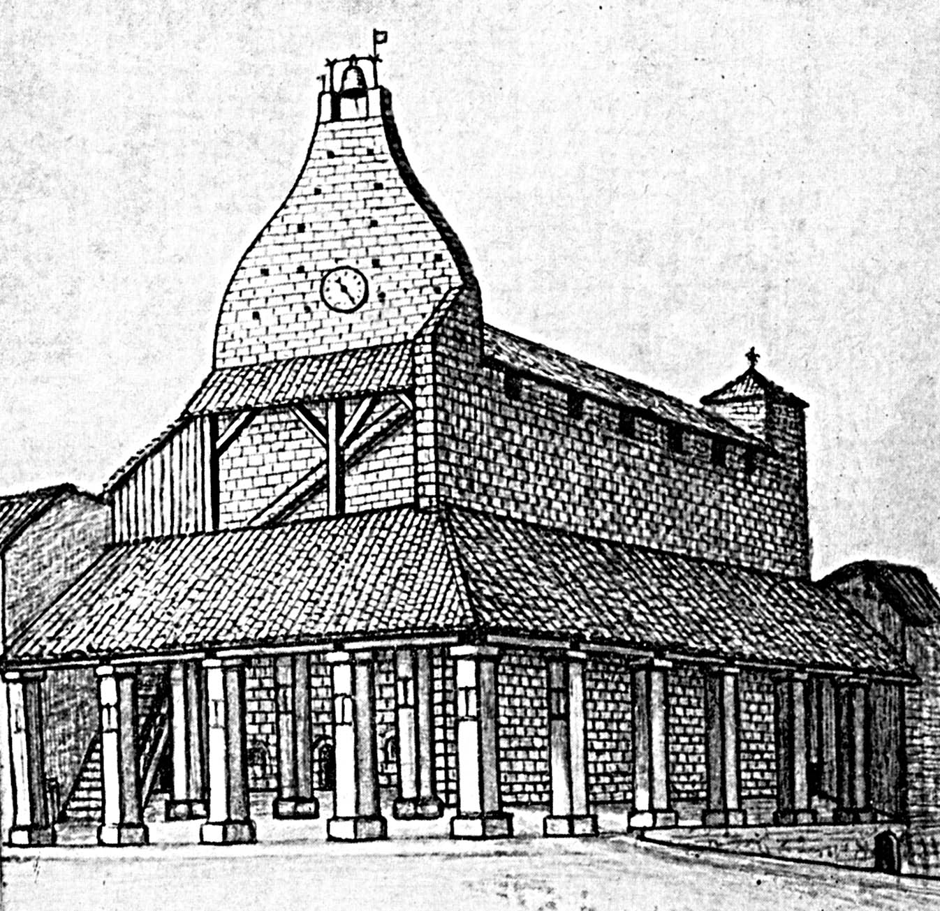 Ancienne halle et maison commune de Lectoure, Gers, France, construite en 1594, détruite en 1840, dessin d'Eugène Camoreyt d'après un dessin de Verdun, architecte de la ville.